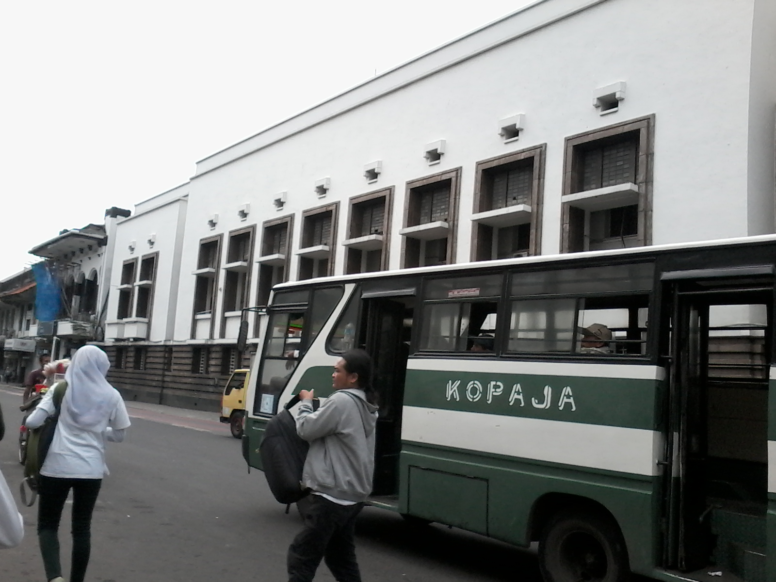 pemandangan jalan kota tua